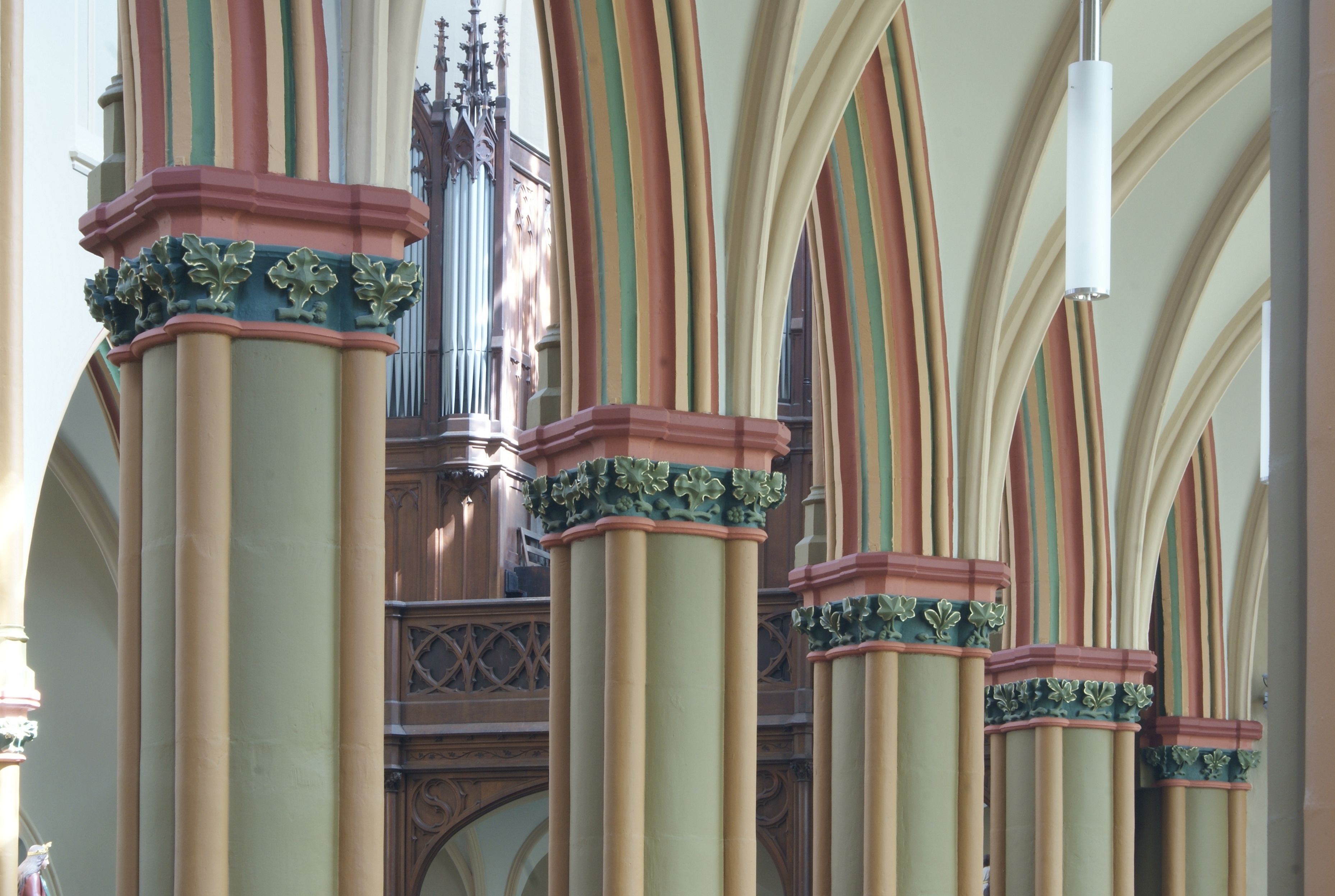 Parochiekerk Sint-Ursula (Lanaken) - De kapitelen van de kerk, met acanthusbladerwerk